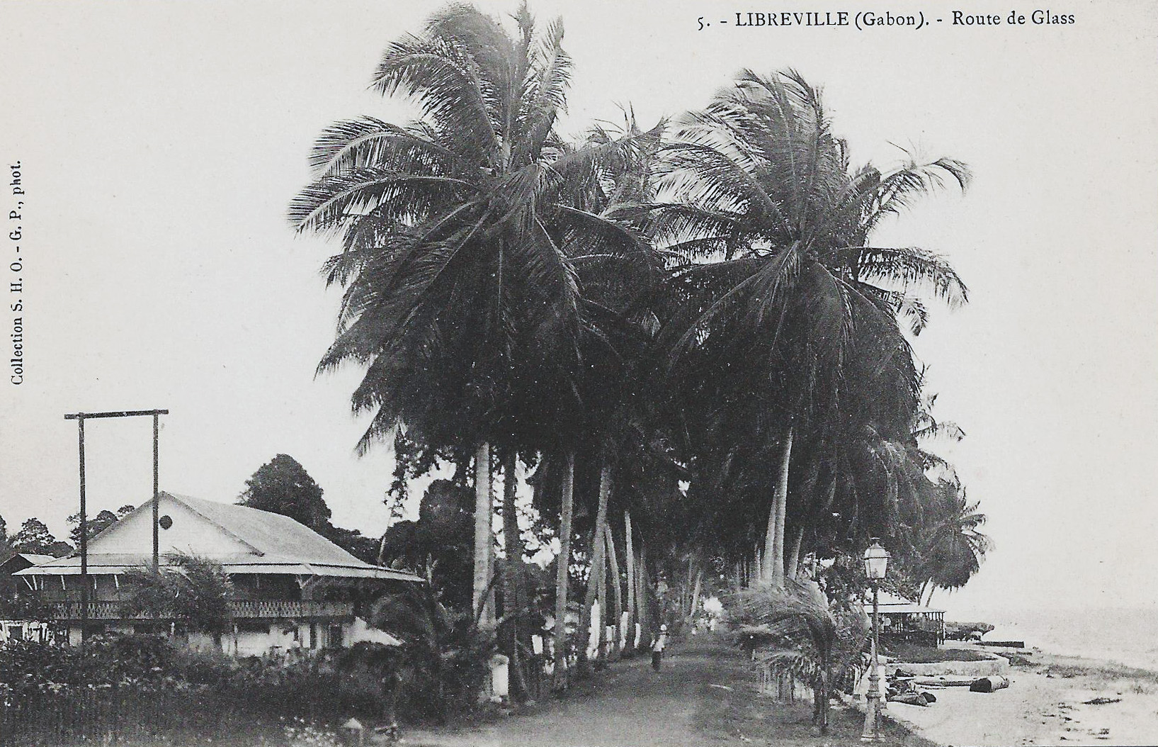 Libreville (Gabon). Route de Glass. Collection S.H.O. - G.P. phot.